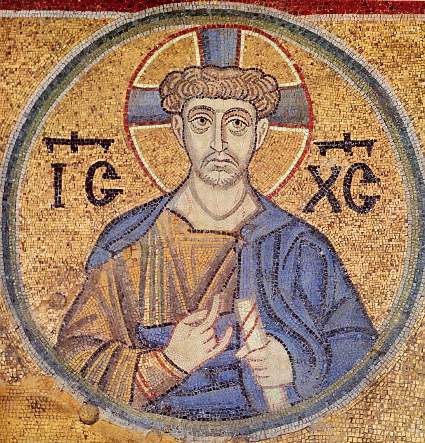 Спас Иерей Мозаика киевского Софийского собора